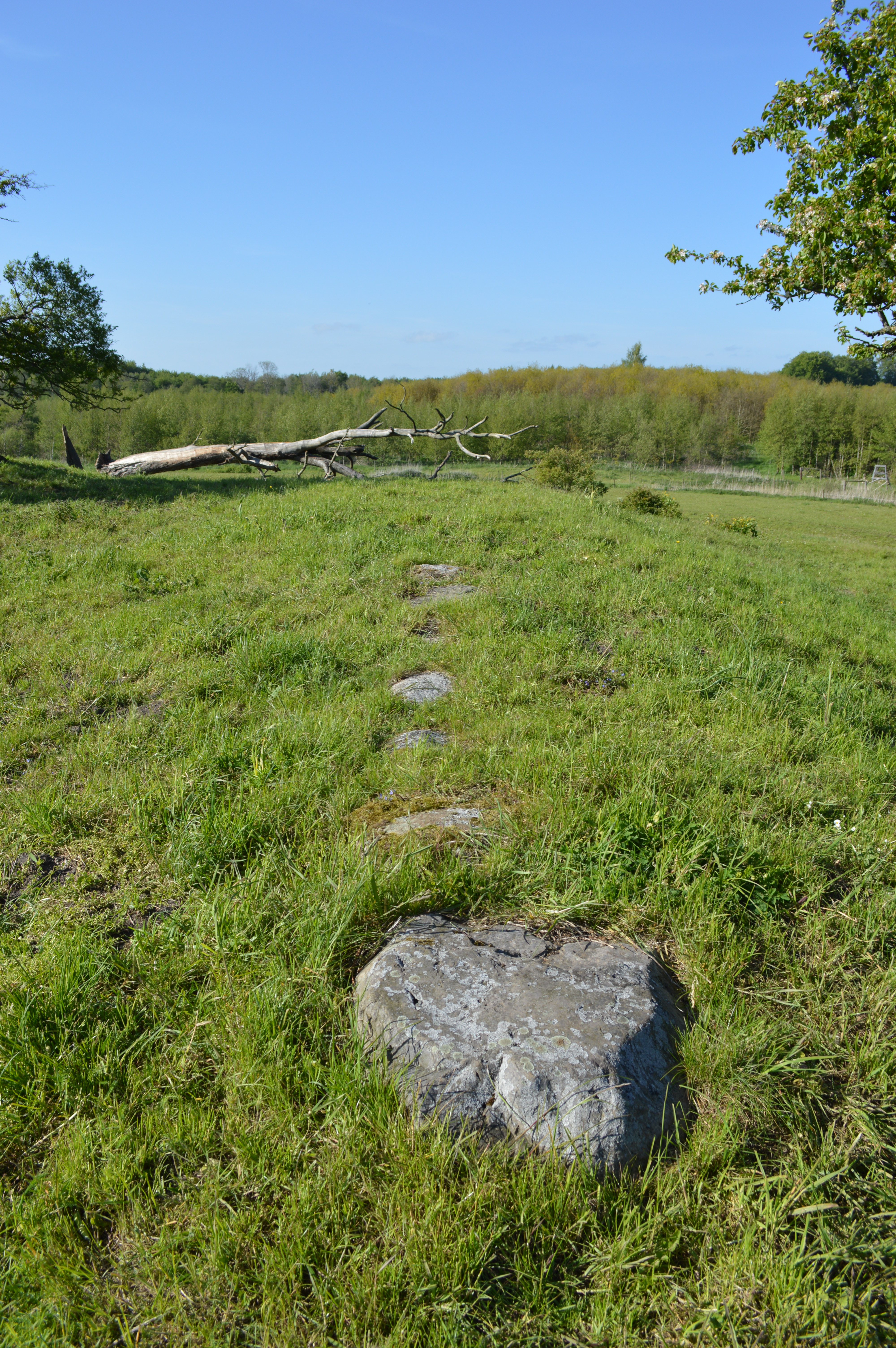 Stenarna som finns kvar av Lindhomens borg